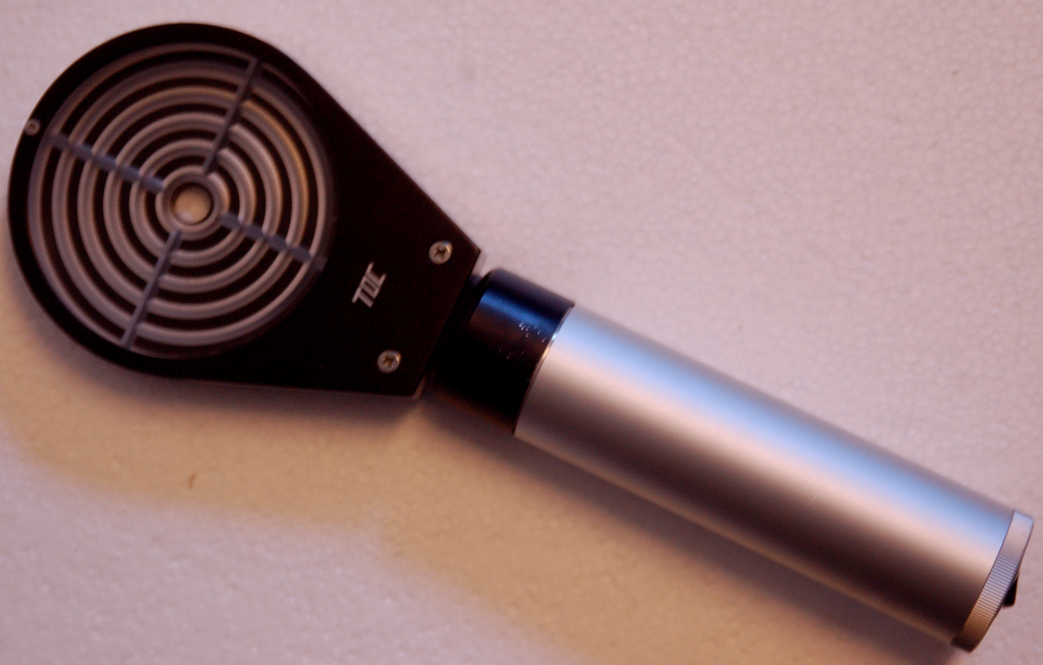 Placidos keratoscope, fabrikat TOC, På svenska även benämnd Placidos skiva